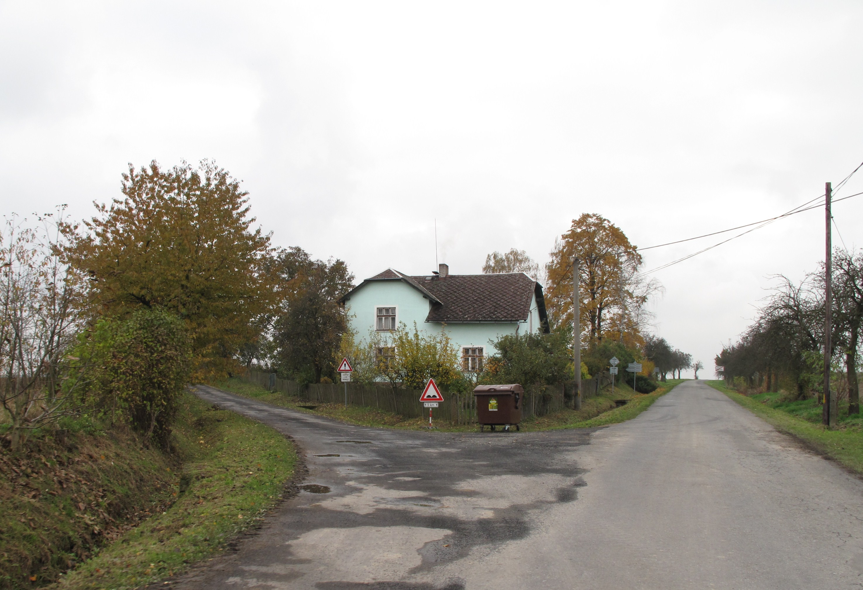 Ostrá Hora. Okres Bruntál, Česká republika.